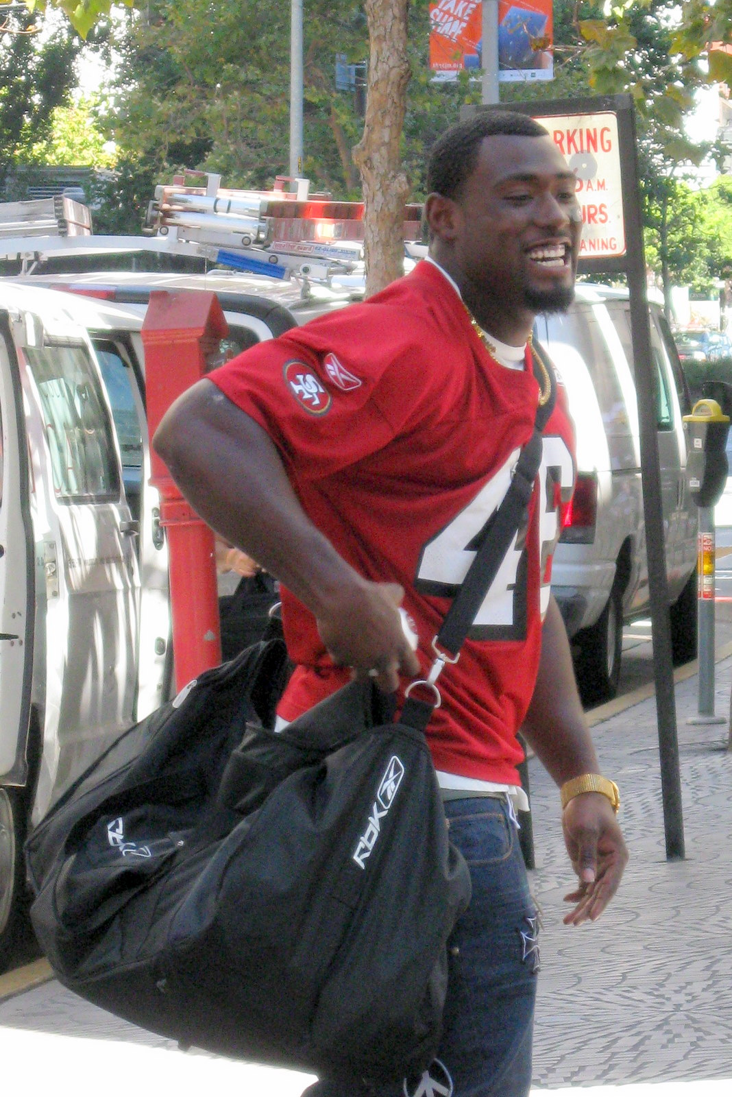 Delanie Walker